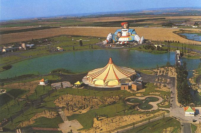 Mirapolis (Val-d'Oise, France) vu du ciel.